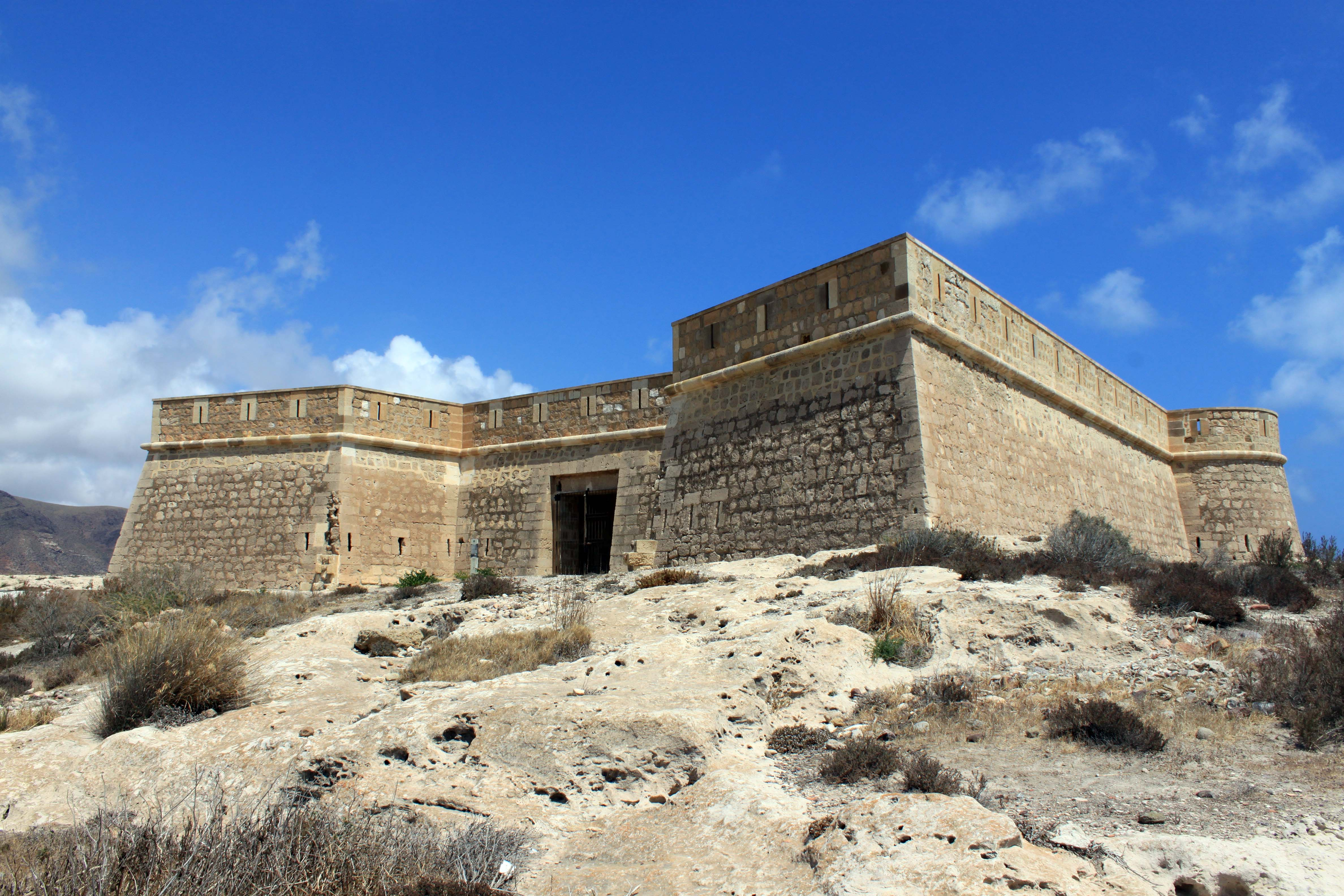 Imagen del Castillo o batería de San Felipe en la localidad almeriense de Los Escullos (Andalucía, España). Se observa la fachada principal con la entrada a la fortificación y los dos baluartes.